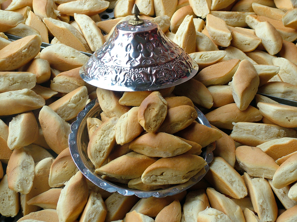 Beypazarı, Ankara